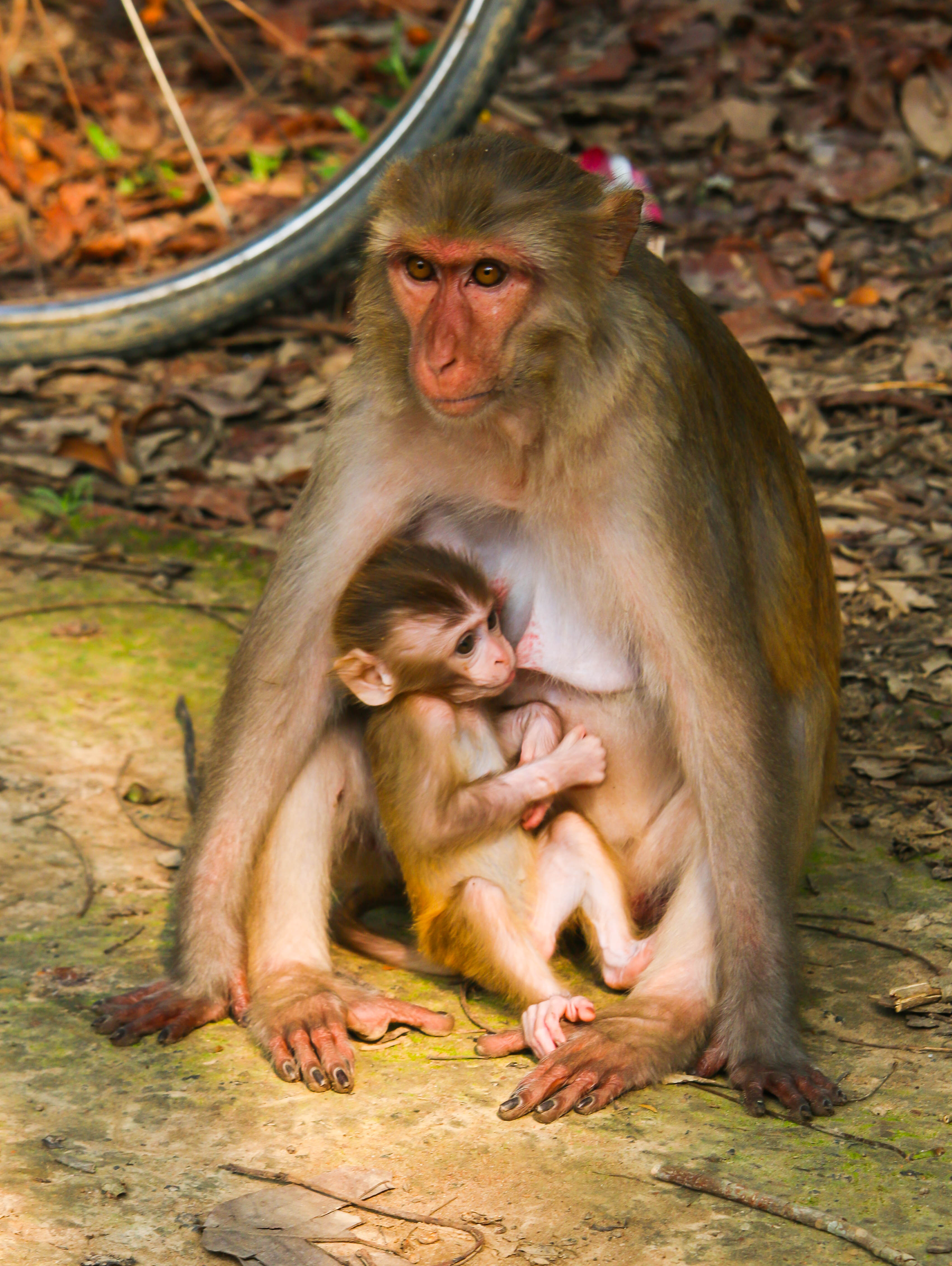 মধুপুর জাতীয় উদ্যান